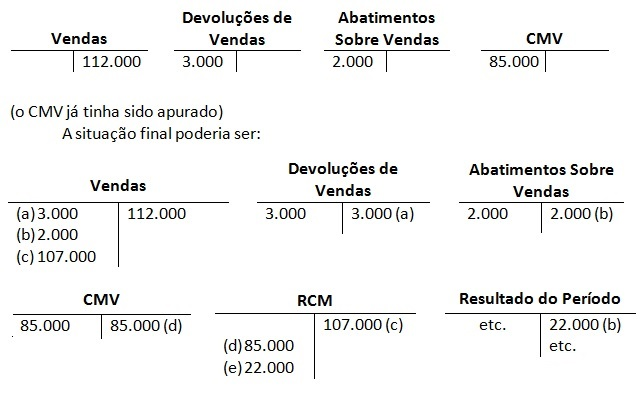 Exemplo retirado do livro para fins acadêmicos, Todos os direitos reservados